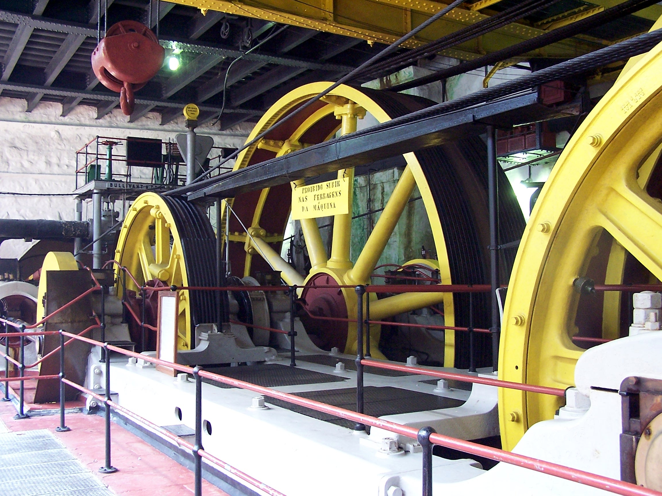 Paranapiacaba - Santo André - SP - Brasil. Locobreque, casa de máquina, sistema a vapor para movimentar o cabo de transporte do locobreque. Foto de Paulo Carmona Sanches Neto - 2005